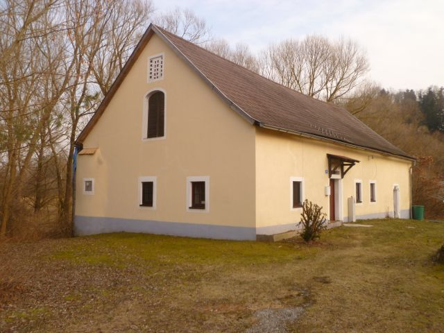 Schloss Neydharting-heute